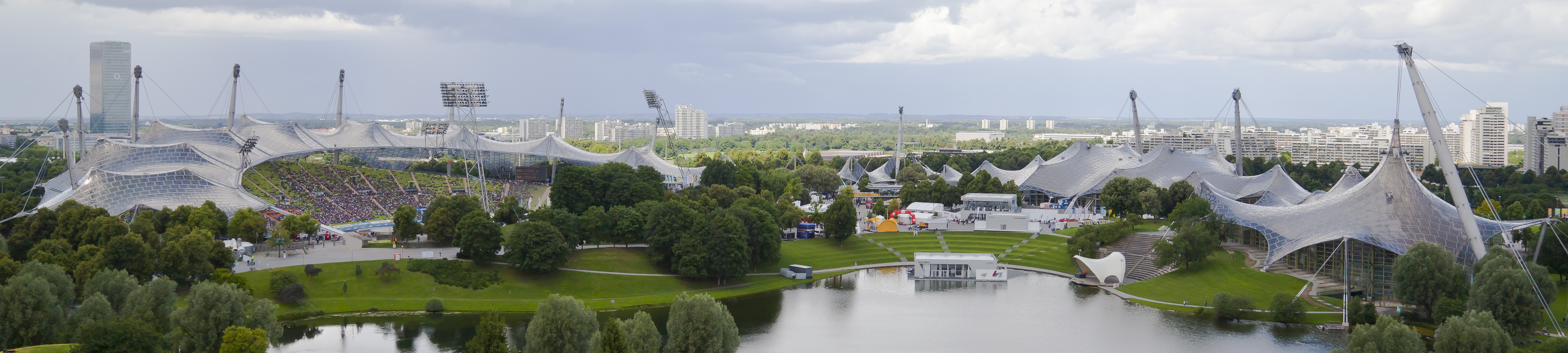 Das Olympiazeltdach in München